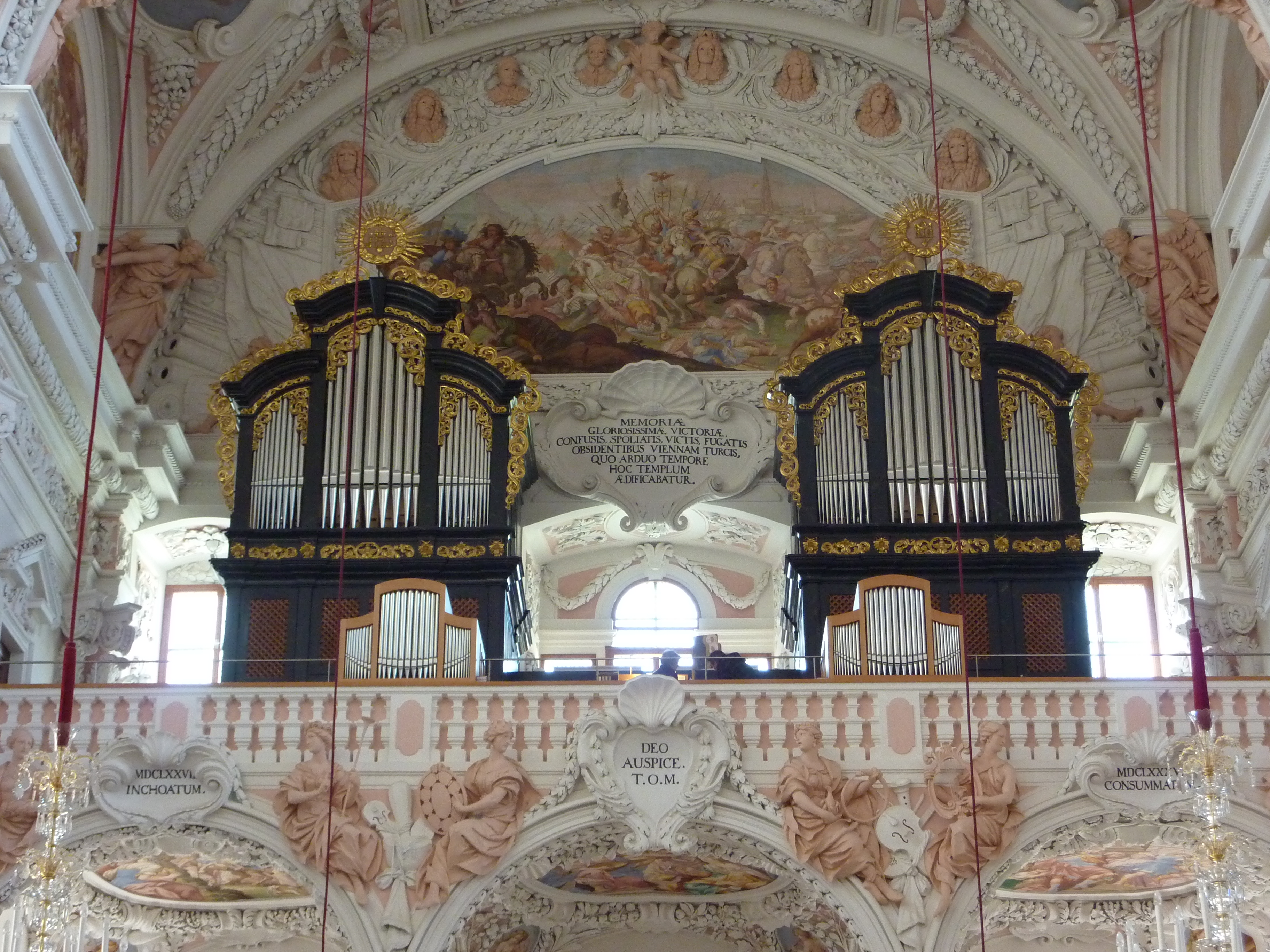 Kath. Pfarrkirche Mariä Himmelfahrt, ehem. Klosterkirche, Am Platzl, Garsten, Oberösterreich - Orgel (Fa. Rudolf von Beckerath, 2009), an der Westwand Fresko und Inschrift zur Zweiten Wiener Türkenbelagerung